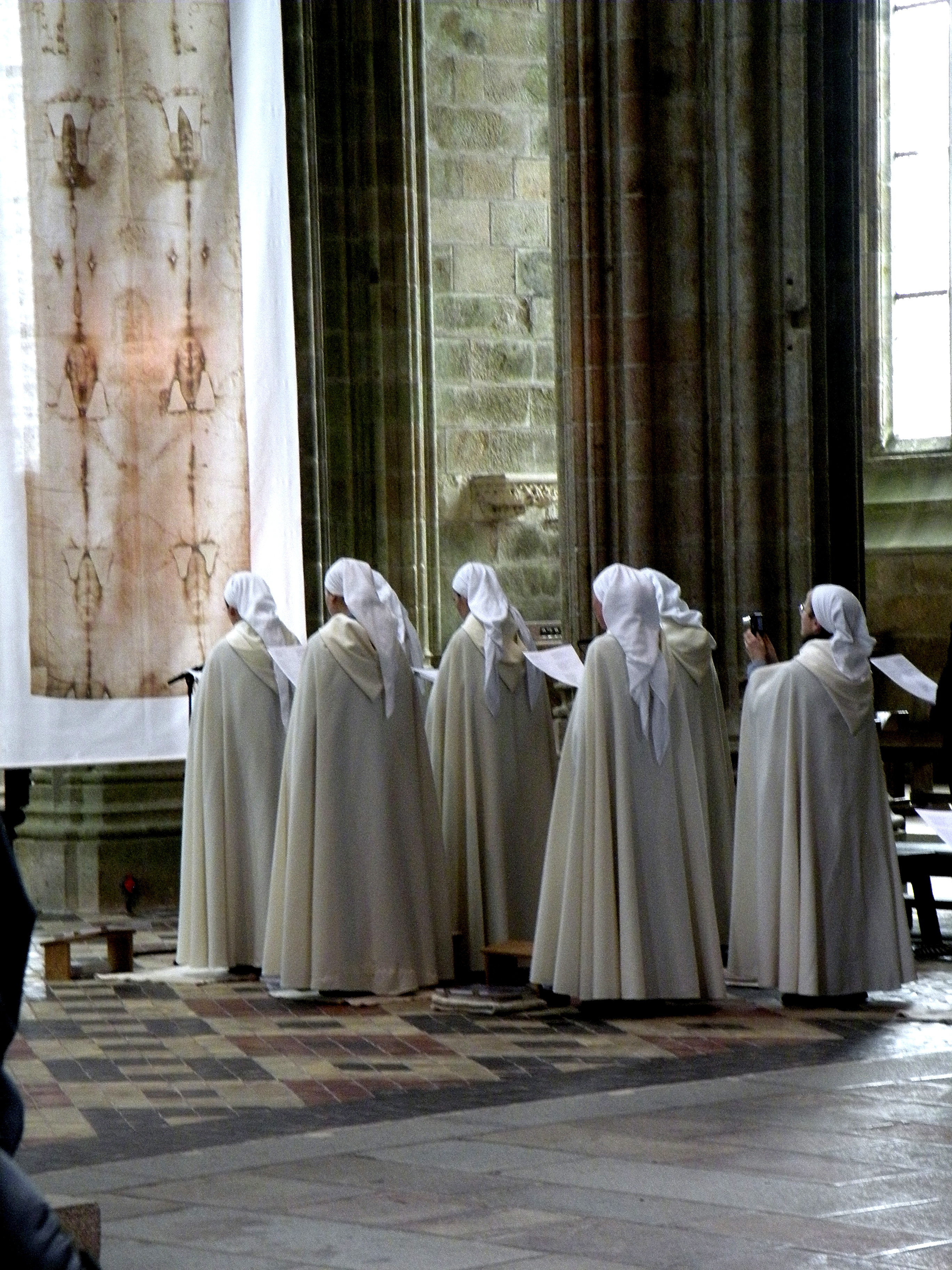 Мон-сен-Мишель.Служба в соборе